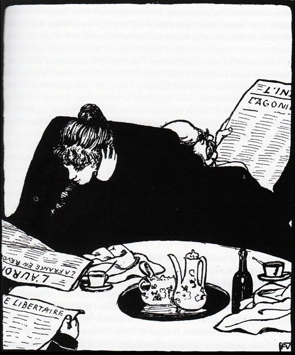 Le père de famille lit le journal antidreyfusard L'Intransigeant tandis que la jeune femme, lui tournant le dos, est plongée dans le quotidien dreyfusard L'Aurore. On devine, dans le coin en bas et à gauche, son fils (?) lisant Le Libertaire, feuille anarchiste dirigée alors par Sébastien Faure, favorable à Dreyfus. En famille de Félix Vallotton, gravure sur bois publiée dans Le Cri de Paris, 13 février 1899.